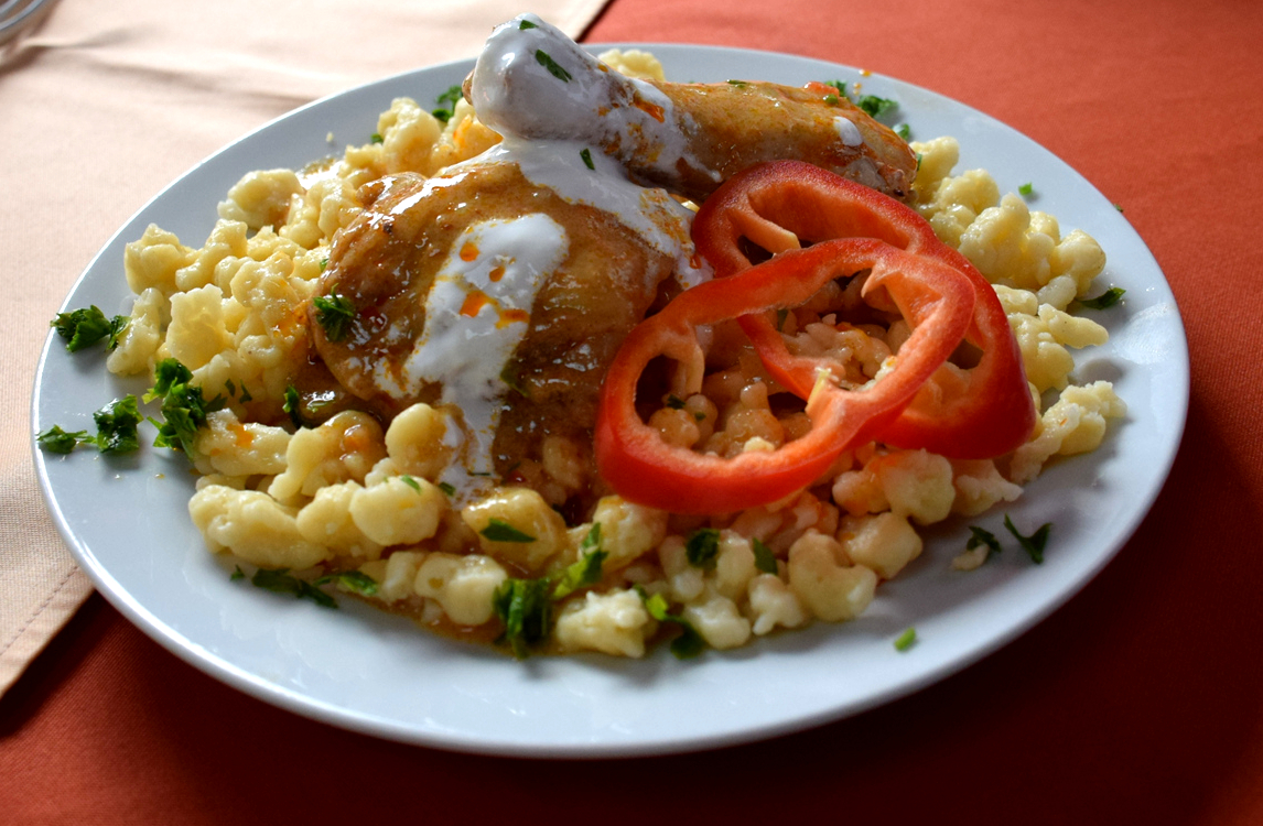 Celldömölk , csirkepaprikás